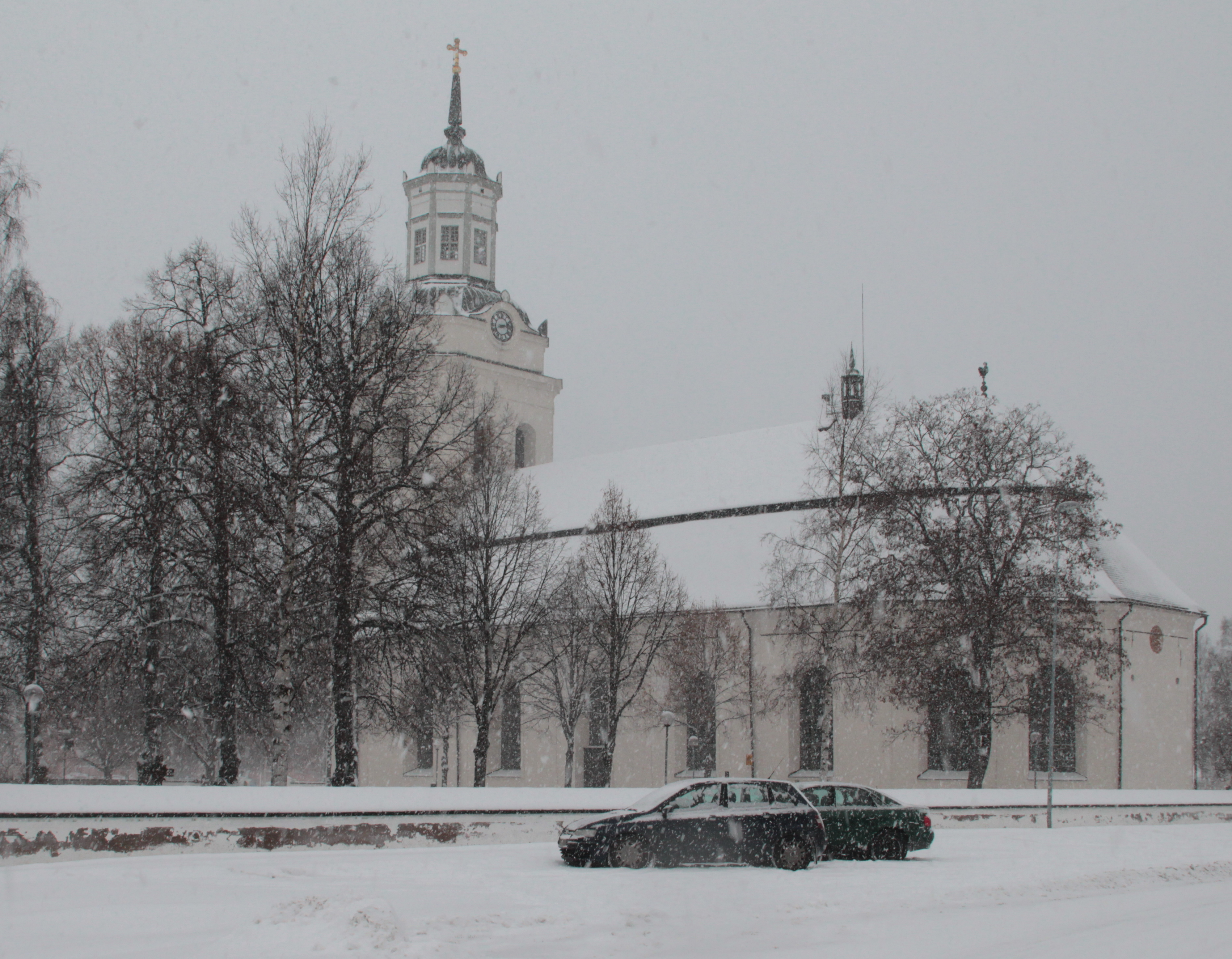 Orsa kyrka i snöfall, Orsa, Sverige